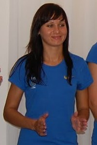 Olena Khomrova